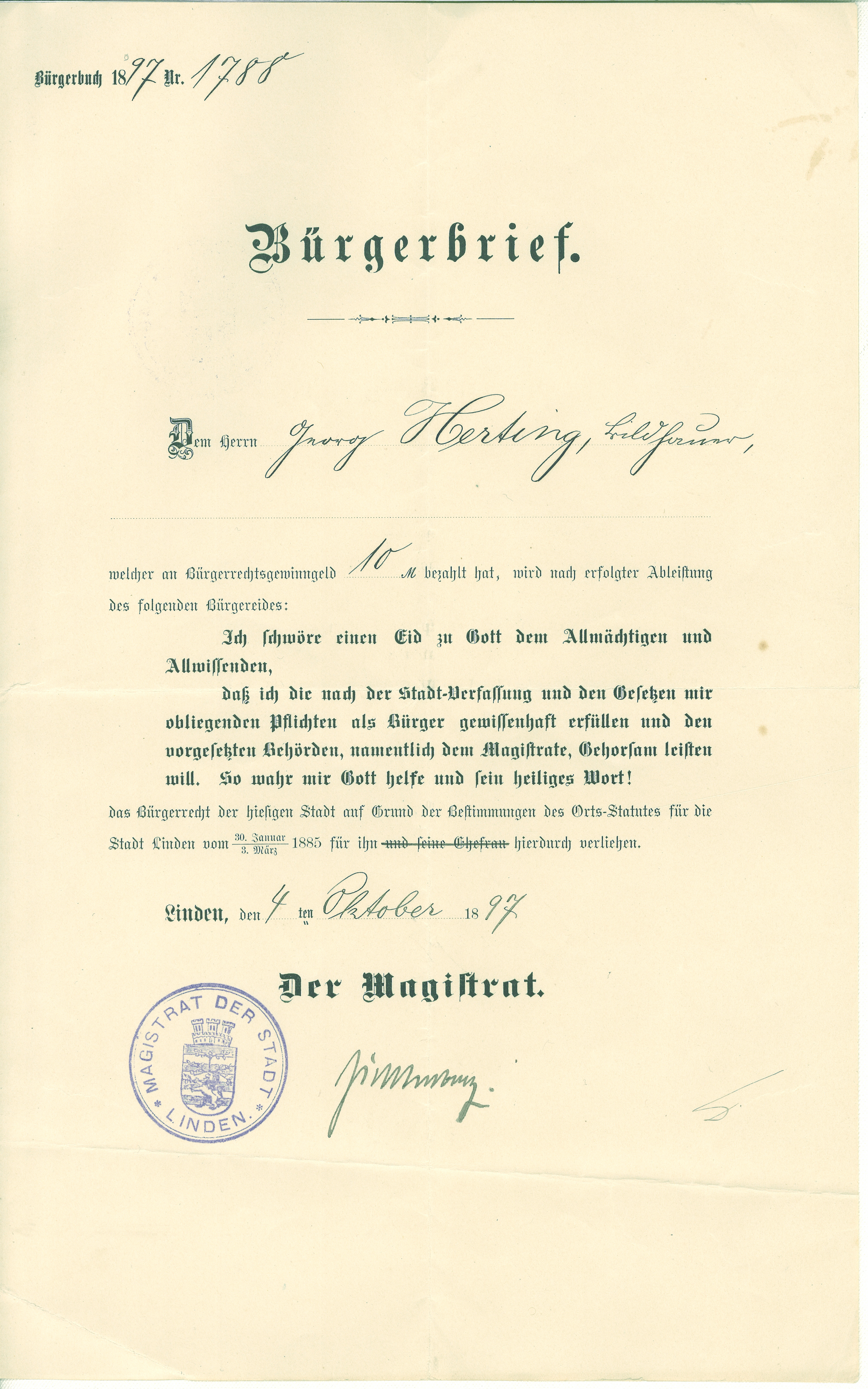 „Bürgerbuch 1897 Nr. 1788 / Bürgerbrief / Dem Herrn Georg Herting, Bildhauer / welcher an Bürgerrechtsgewinngeld 10 M(ark) bezahlt hat, wird nach erfolgter Ableistung des folgenden Bürgereides: Ich schwöre einen Eid zu Gott dem Allmächtigen und Allwissenden, daß ich die nach der Stadt-Verfassung und den Gesetzen mir obliegenden Pflichten als Bürger gewissenhaft erfüllen und den vorgesetzten Behörden, namentlich dem Magistrate, Gehorsam leisten will. So wahr mir Gott helfe und sein heiliges Wort! das Bürgerrecht der hiesigen Stadt auf Grund der Bestimmungen des Orts-Statutes für die Stadt Linden vom 30. Januar/3. März 1885 für ihn und seine Ehefrau hierdurch verliehen. / Linden, den 4. Oktober 1897 - Der Magistrat (Stempel "Magistrat der Stadt Linden" mit Wappen, Unterschrift).“ 4-seitiges gefaltetes Blatt ohne Wasserzeichen oder Druckerzeichen, die restlichen 3 Seiten sind unbedruckt, unbeschrieben. Format etwas größer als DIN A3, gefaltet. Der Brief wurde vermutlich in einem kleineren Briefumschlag versandt. Der originale Bürgerbrief wurde am 16. September 2013 dem Stadtarchiv Hannover zu Händen der Direktorin Cornelia Regin als Schenkung übereignet ...